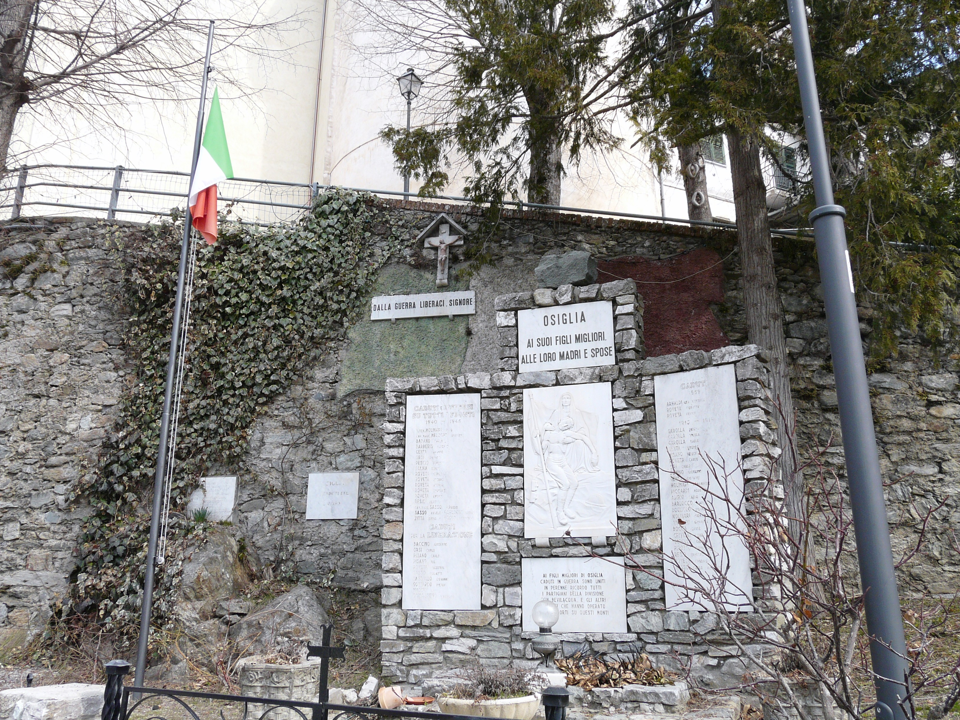 Monumenti ai caduti, Osiglia, Liguria, Italia